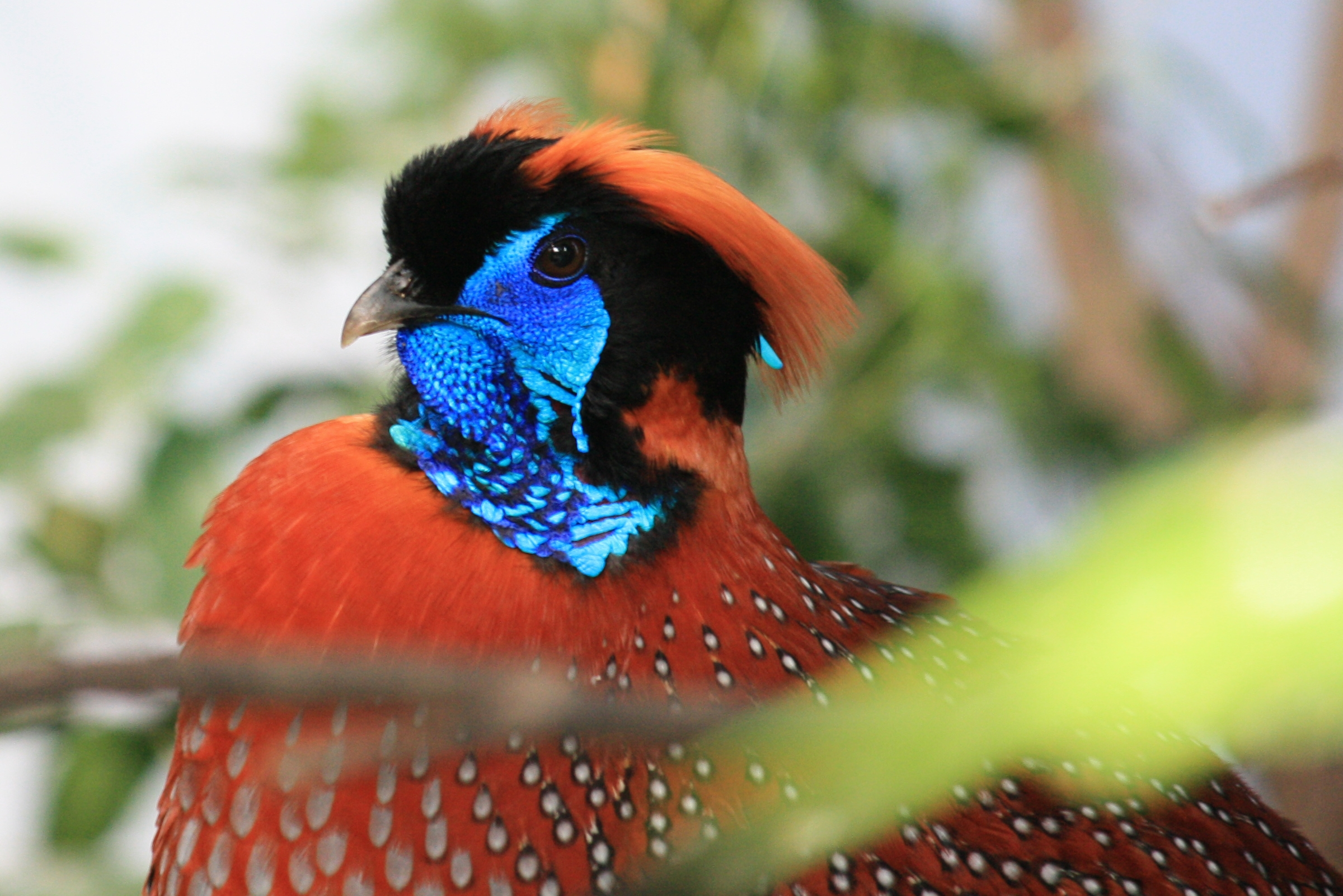 Satyr Temminckův v pražské Zoo